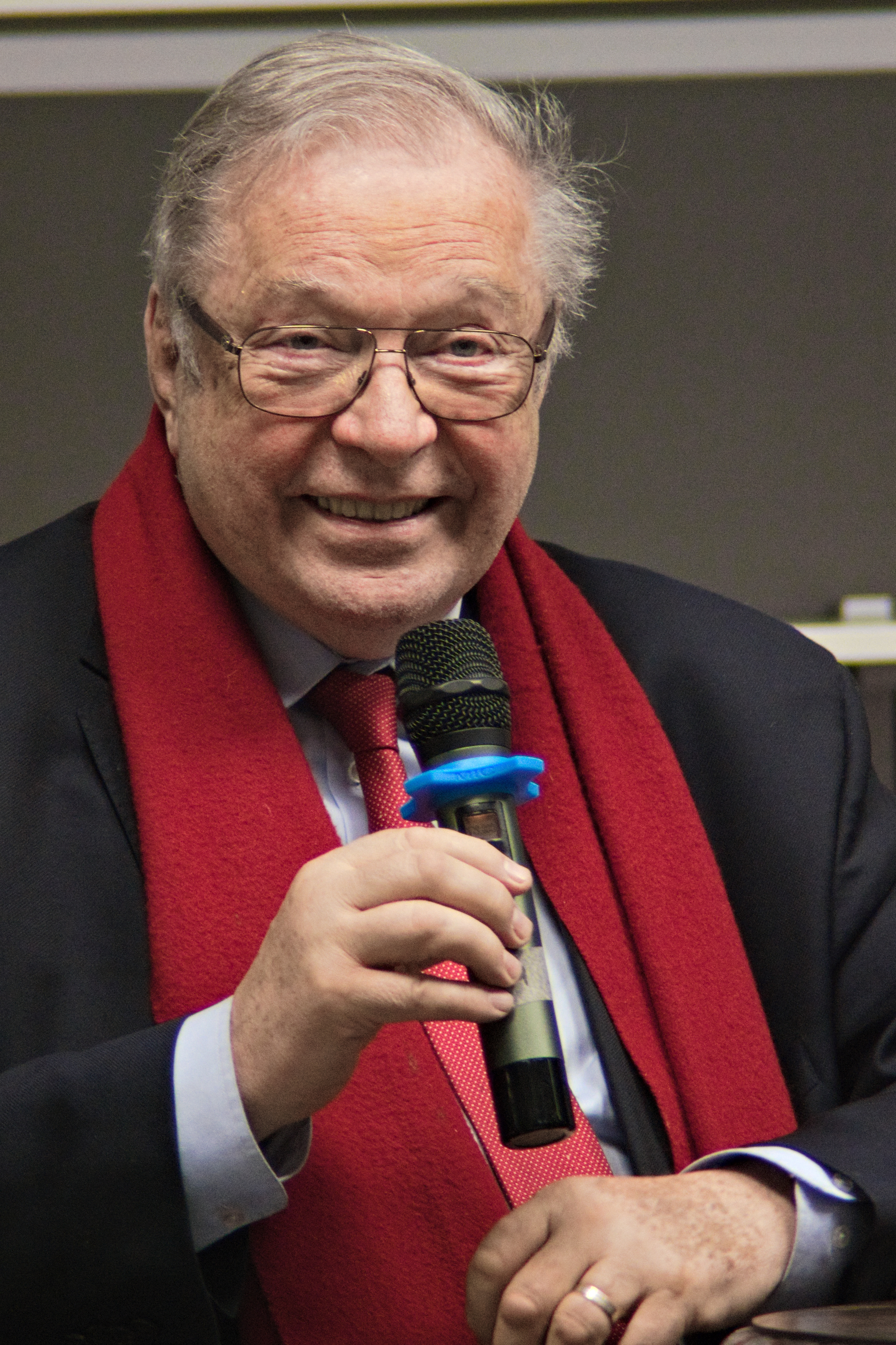 Krzysztof Zanussi na spotkaniu Polifonie/Krzysztof Zanussi/Spotkanie z Mistrzem w Regionalnym Instytucie Kultury (ul. Teatralna 4) w Katowicach, spotkanie prowadziła Barbara Gruszka-Zych (wstęp wolny)